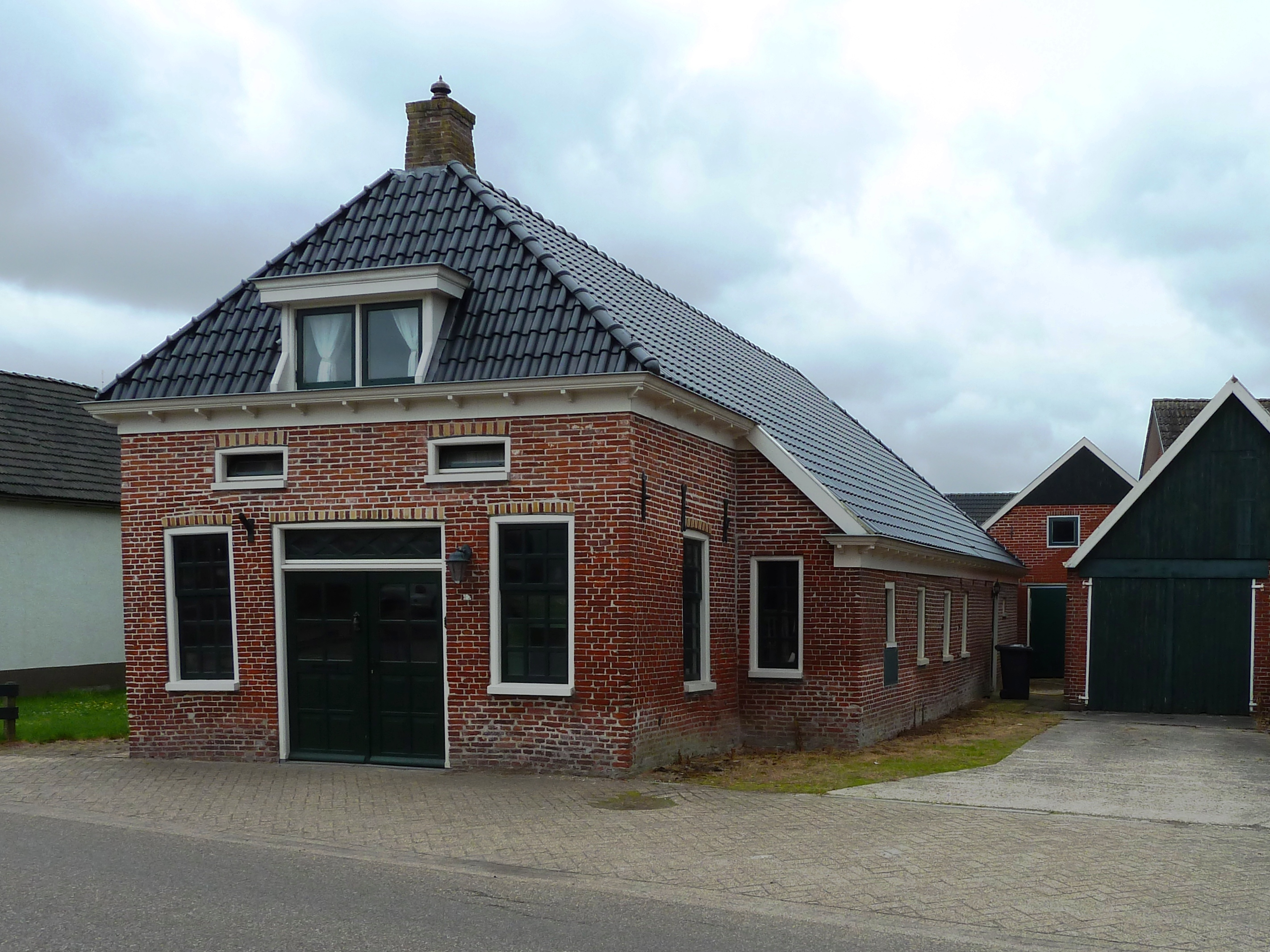 Gerestaureerd huis in Wagenborgen (Delfzijl, Groningen, Nederland).